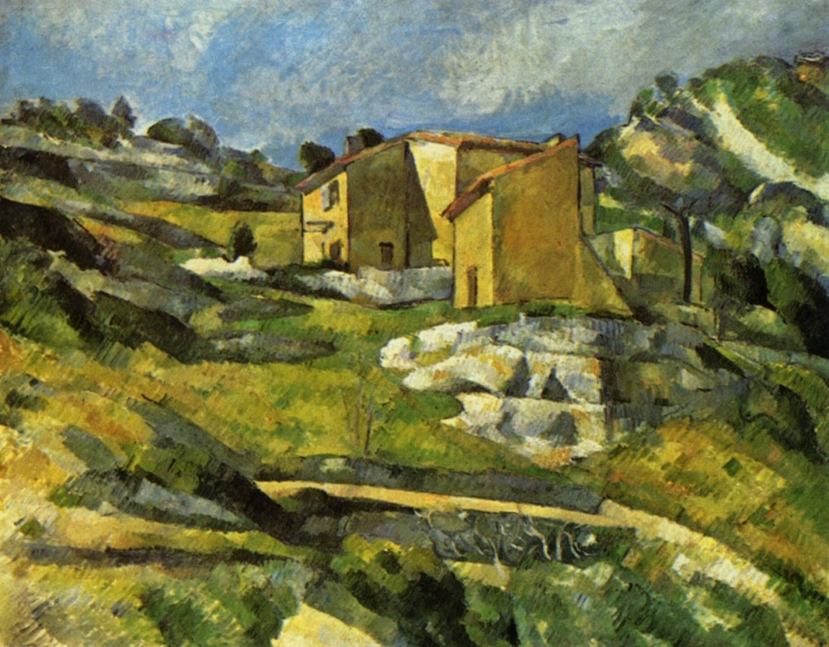 Haus in der Provencetitle QS:P1476,de:"Haus in der Provence" label QS:Lde,"Haus in der Provence"